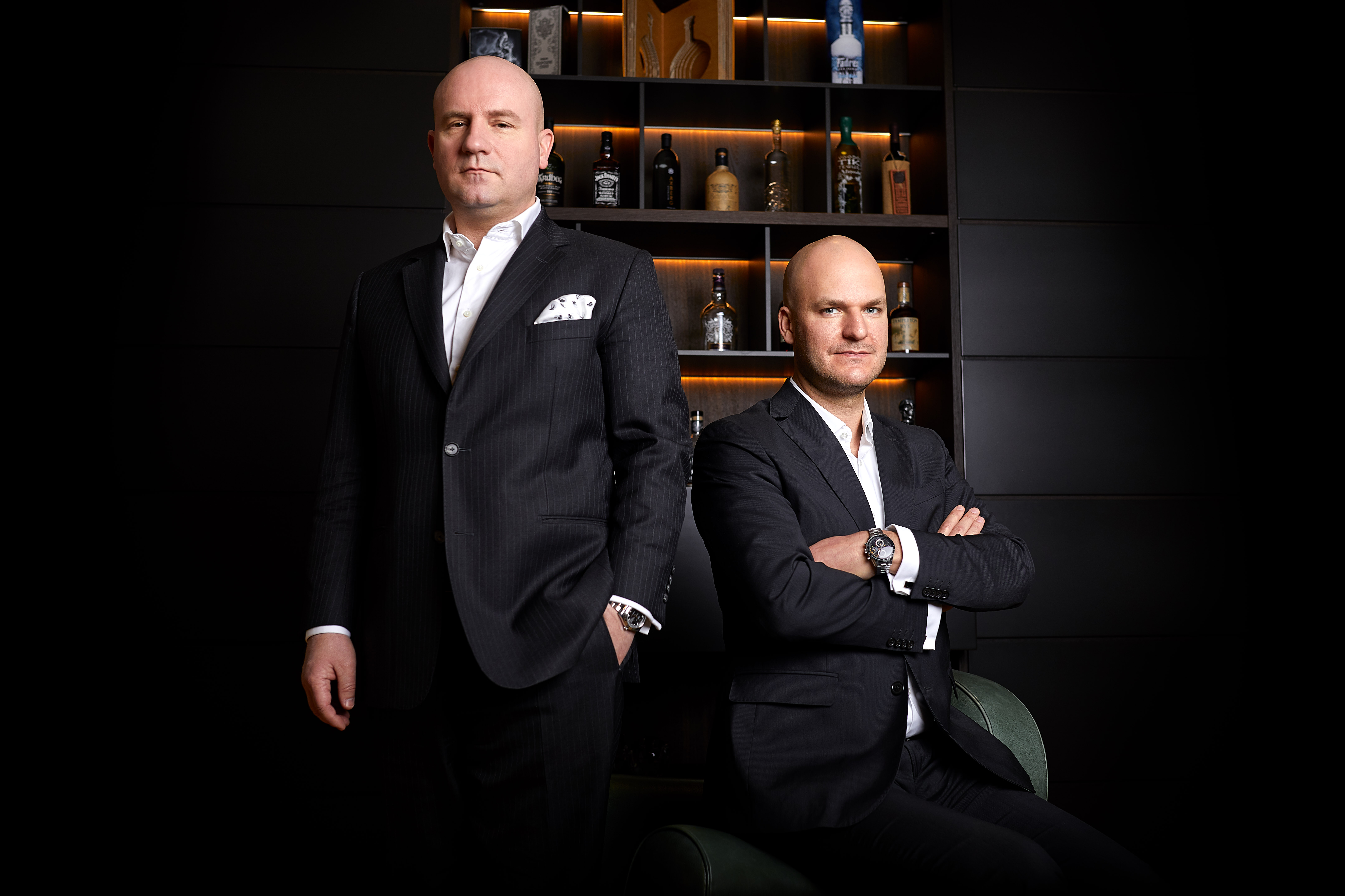 Florian Koschat (l.) und Helmut Kogler (r.) Pallas Capital